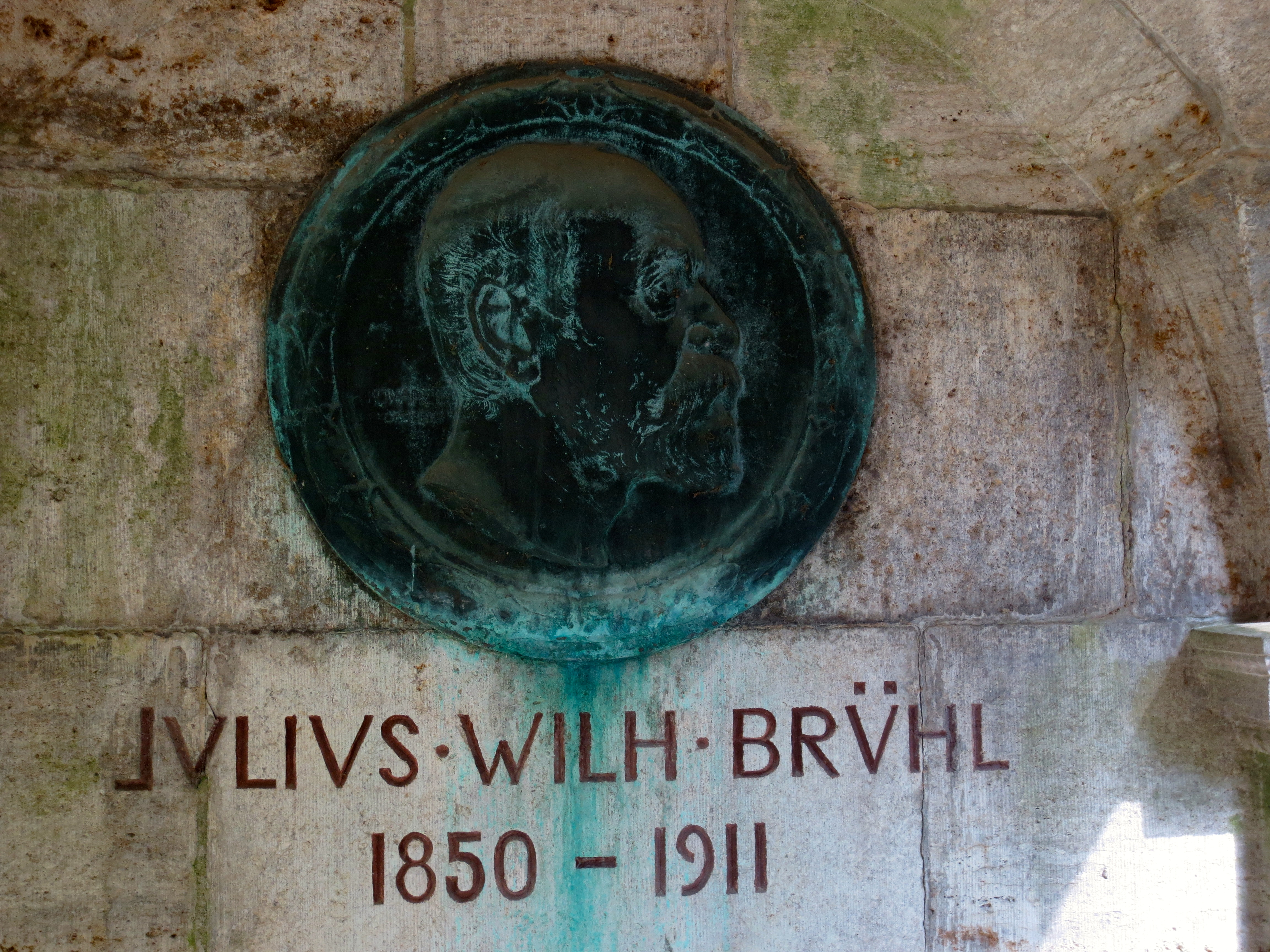 Julius Wilhelm Brühl, Chemiker